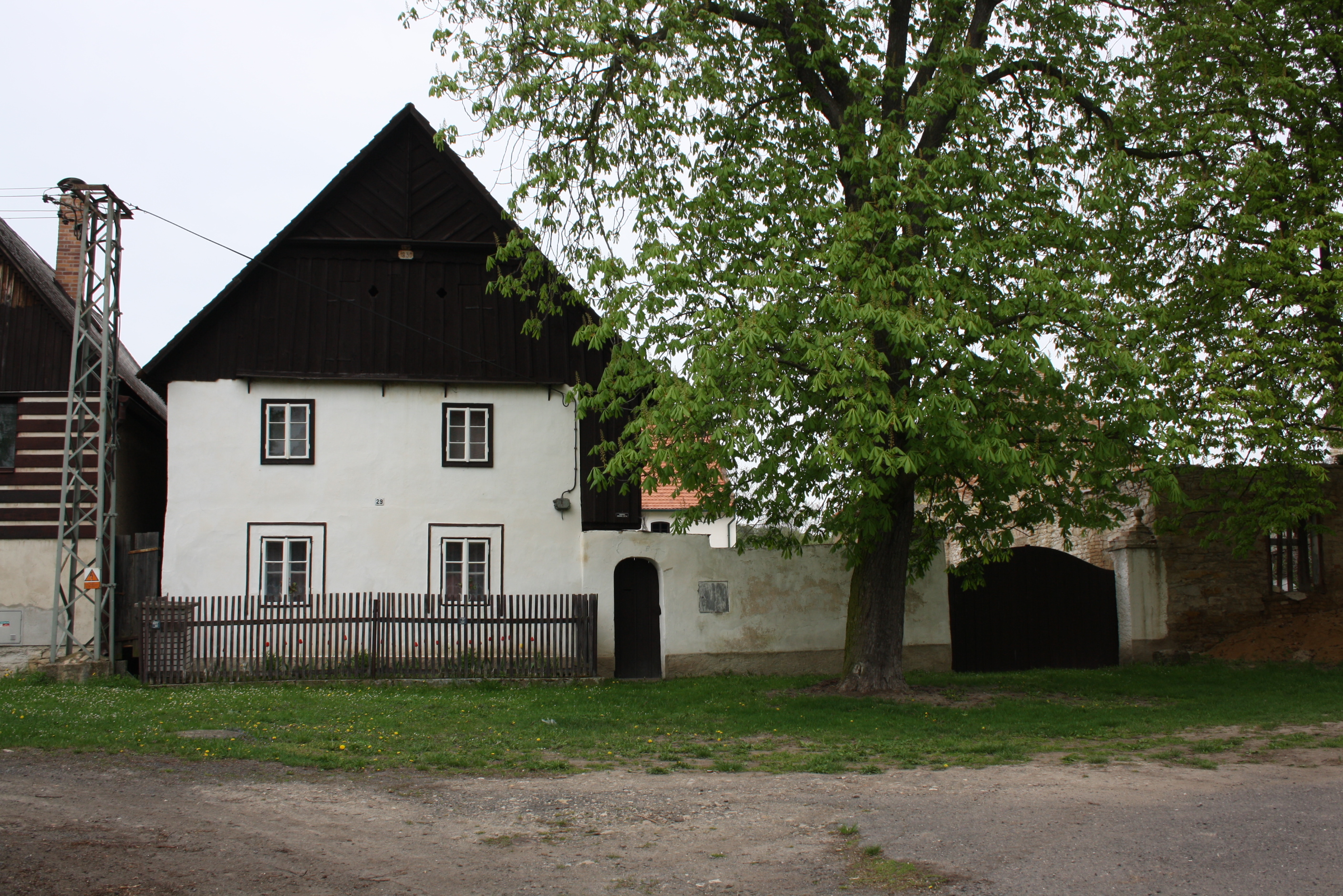 Dům číslo popisné 29 v Hrušovanech, části Polep.